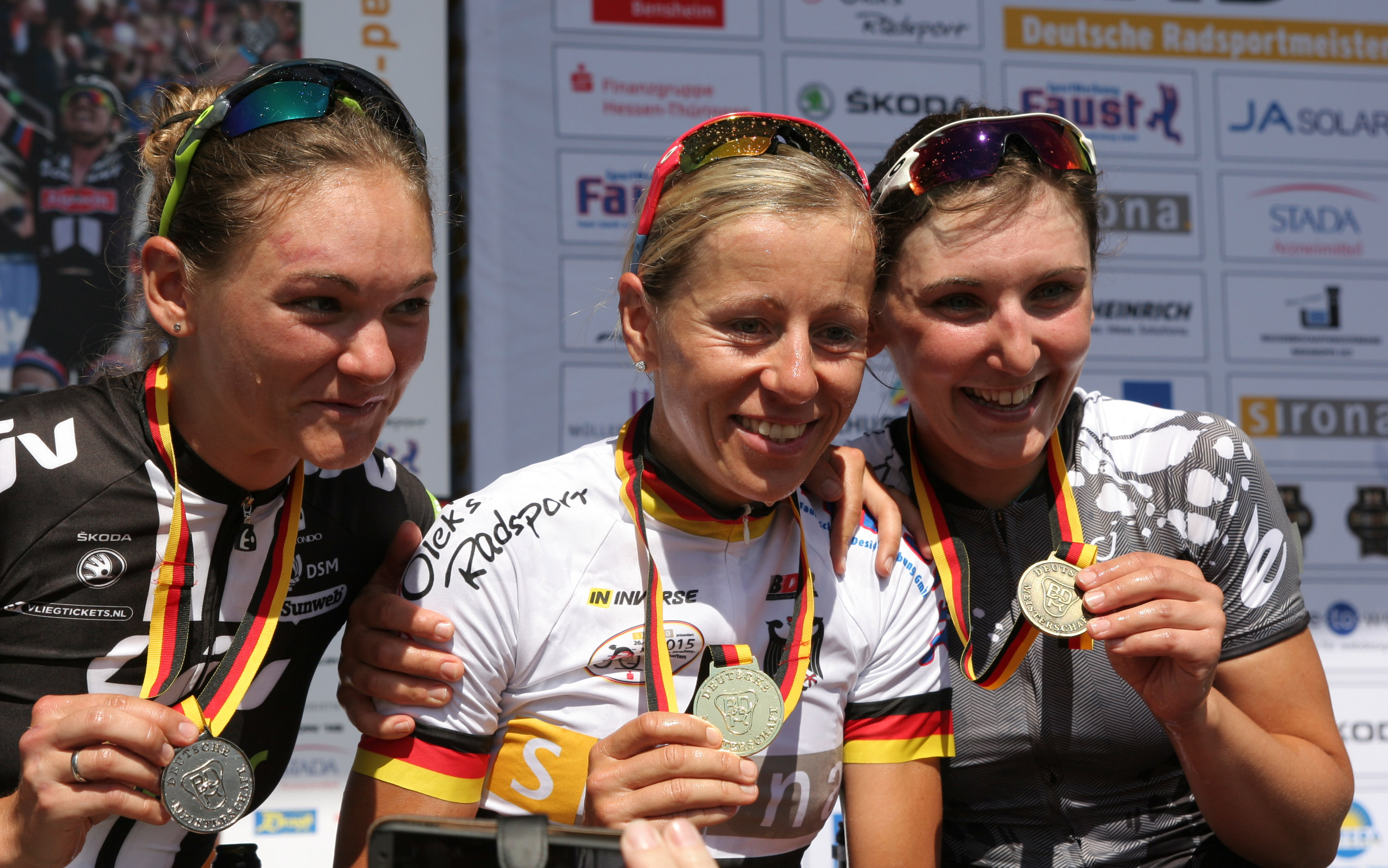 Claudia Lichtenberg, Trixi Worrack und Lisa Brennauer bei der Siegerehrung (v.l.n.r.). Es läuft die Nationalhymne. Foto von den Deutschen Meisterschaften im Straßenrennen der Frauen (Elite) am 28. Juni 2015 in Bensheim (Hessen)